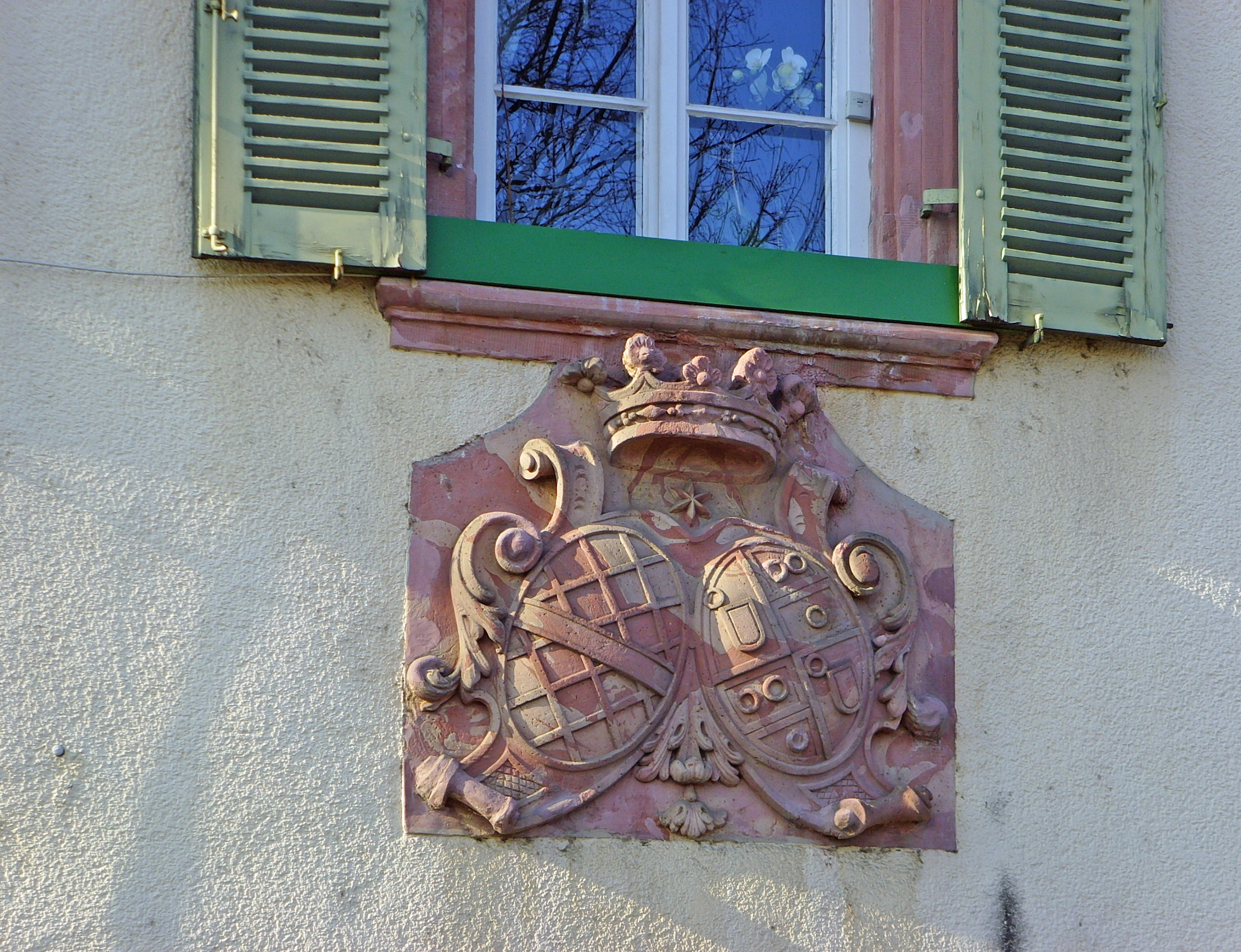 Heddernheimer Neues Schloss, Wappen an der Aussenfassade. Frankfurt am Main, Alt-Heddernheim this photo was taken by User:Gerbil from de.Wikipedia in march 2007 Das Wappen des Freiherrn von Riedt und seiner Frau am Schloss - dem heutigen „Stift“ -, das er sich 1740 erbauen ließ. 1720 hatte er Heddernheim zu Lehen erhalten.